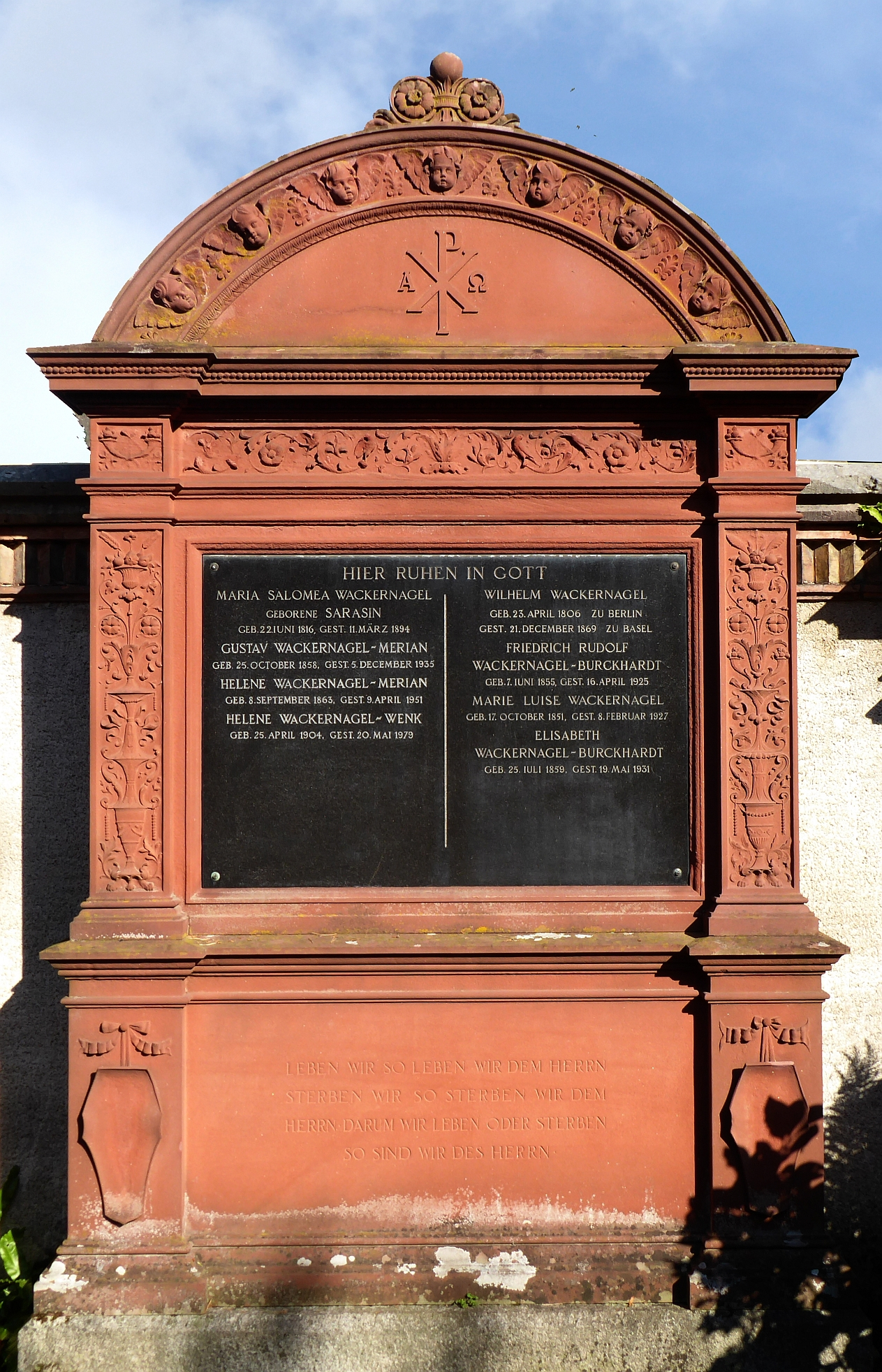 Wilhelm Wackerrnagel, Friedhof Wolfgottesacker, Basel